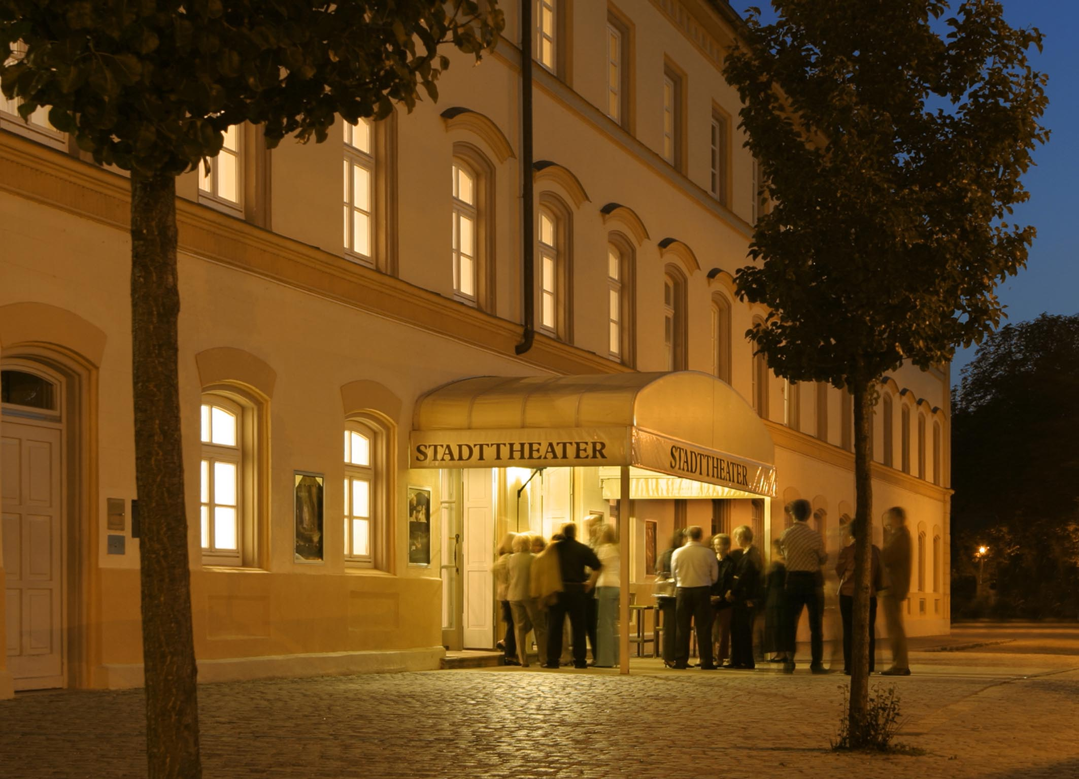 Außenansicht des Stadttheaters in Landshut